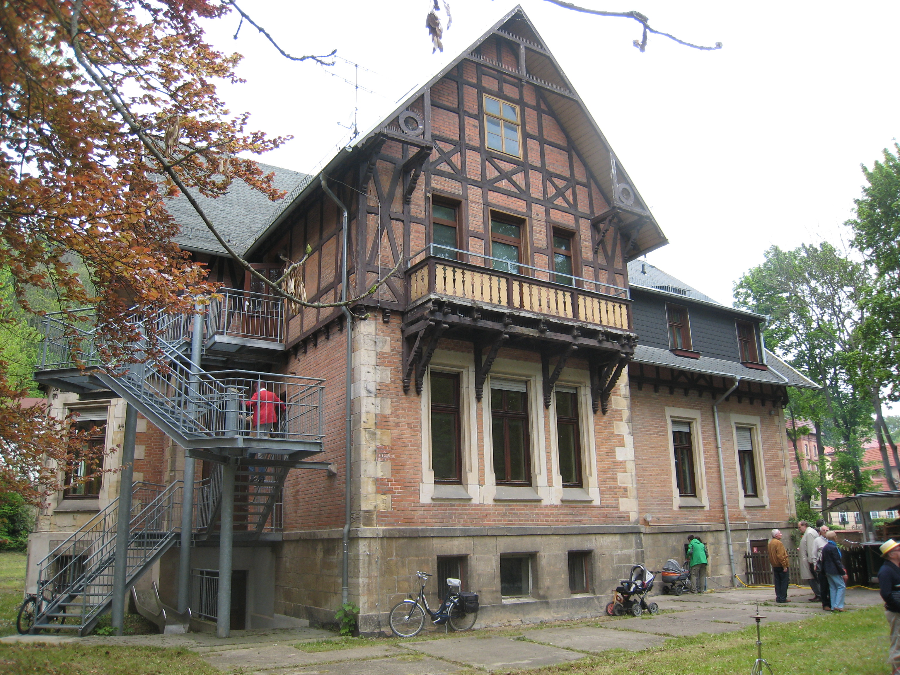 Ostseite der Villa Franz in Arnstadt